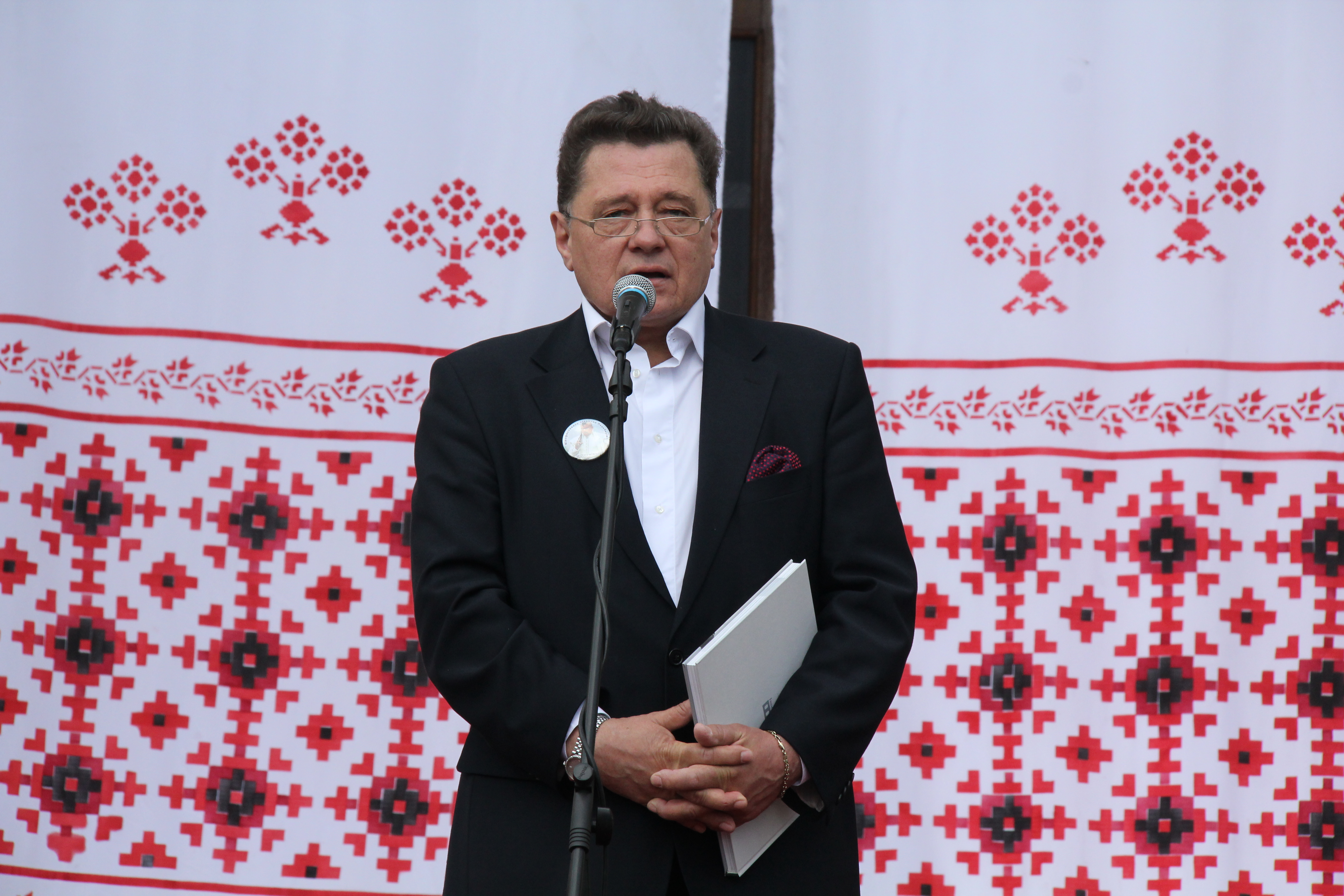 Генеральний директор Національної кіностудії ім. О. Довженка, народний артист України Олесь Янчук на урочистих заходах на Театральній площі у Чернівцях начесть 75-річчя Івана Миколайчука.